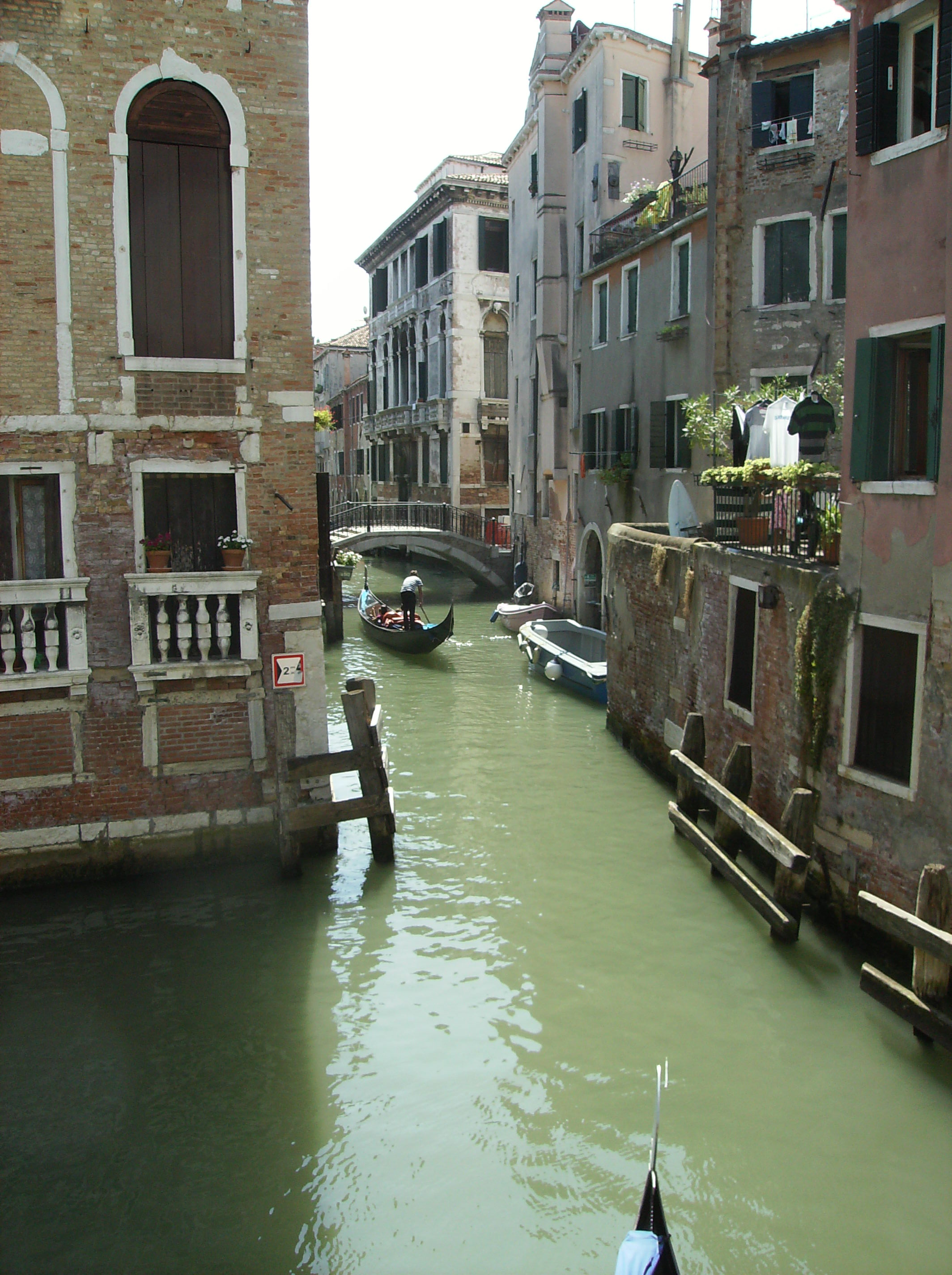 Venise-Rio della Tetta, vers l'est